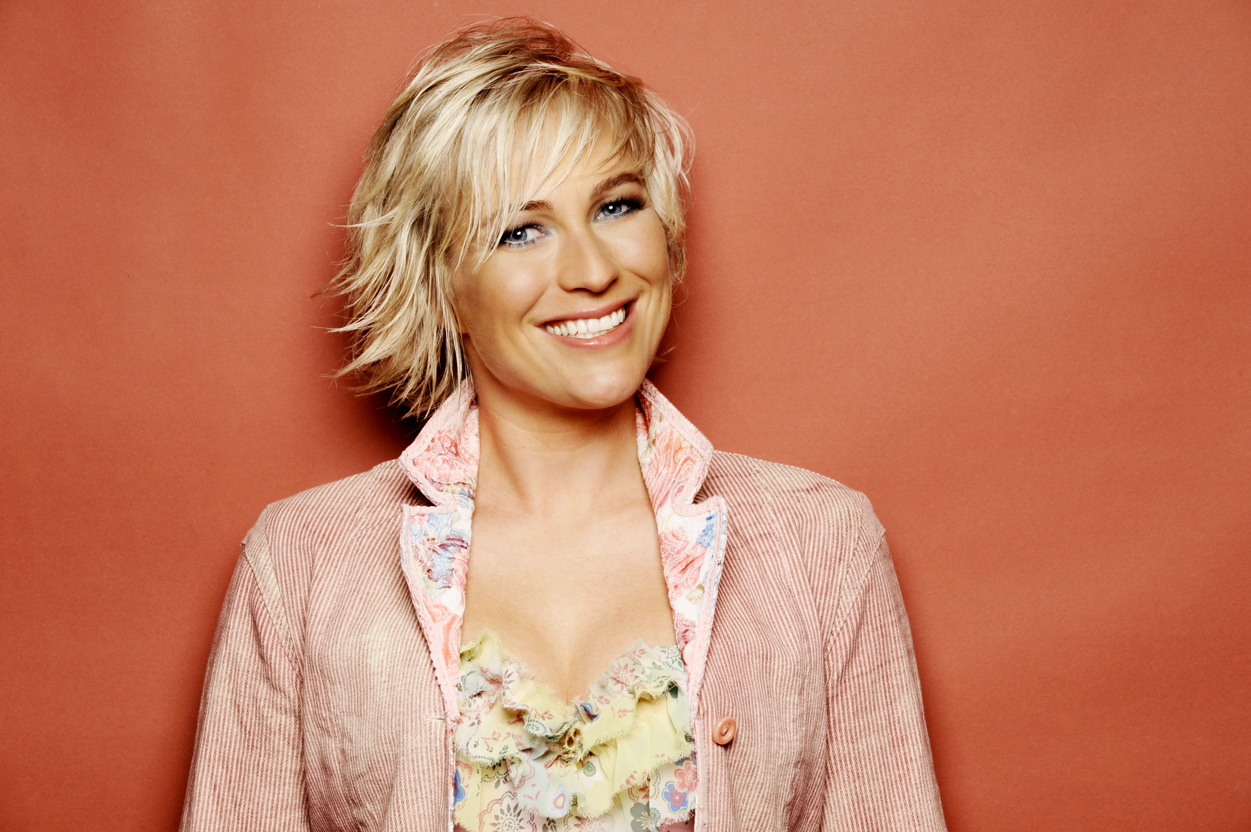 LIANE